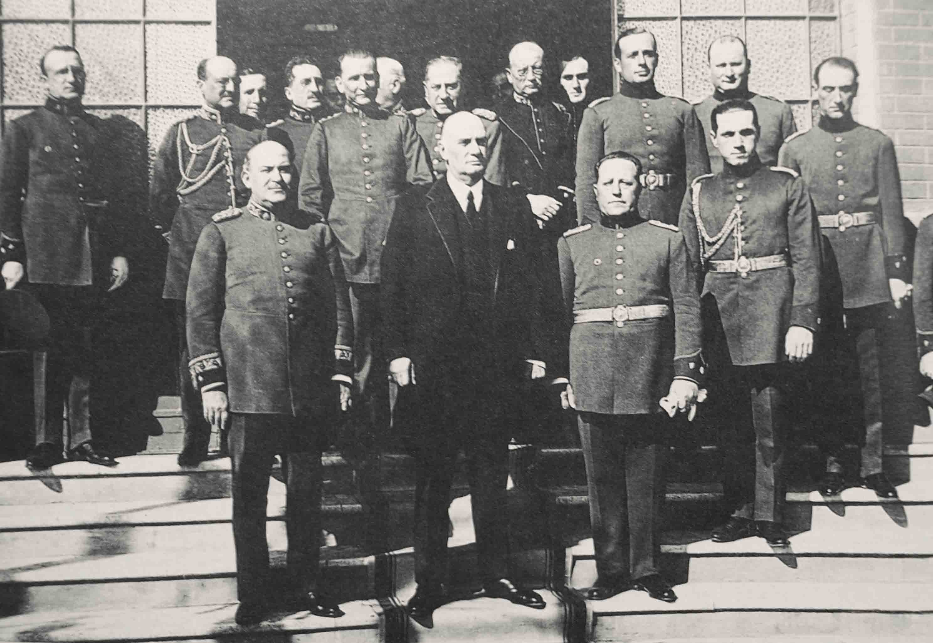 El presidente Marcelo T. de Alvear visita al primer cuerpo de artillería.